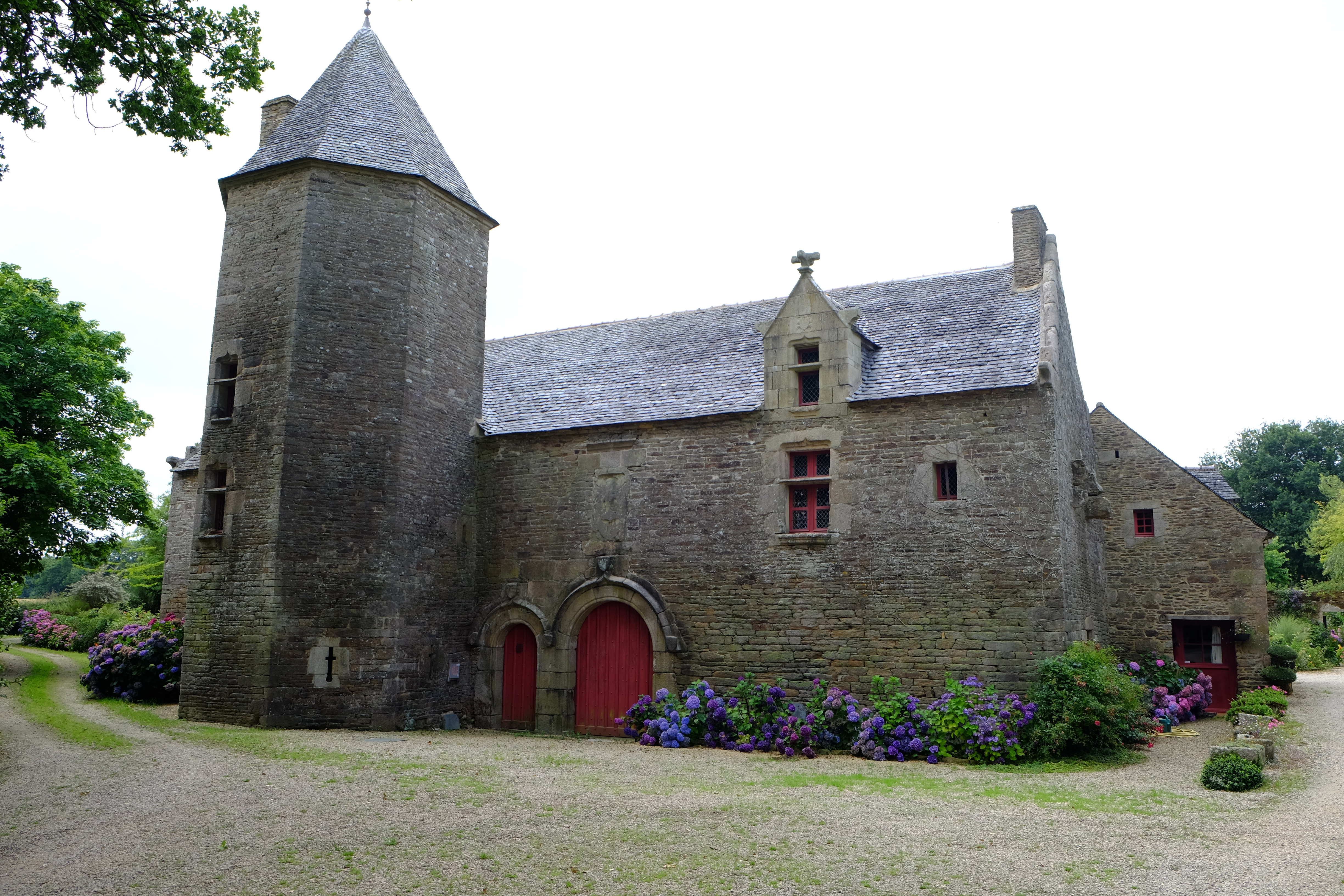 le manoir de Mézedern, Plougonven, Finistère, Bretagne, France (vue générale - extérieur)